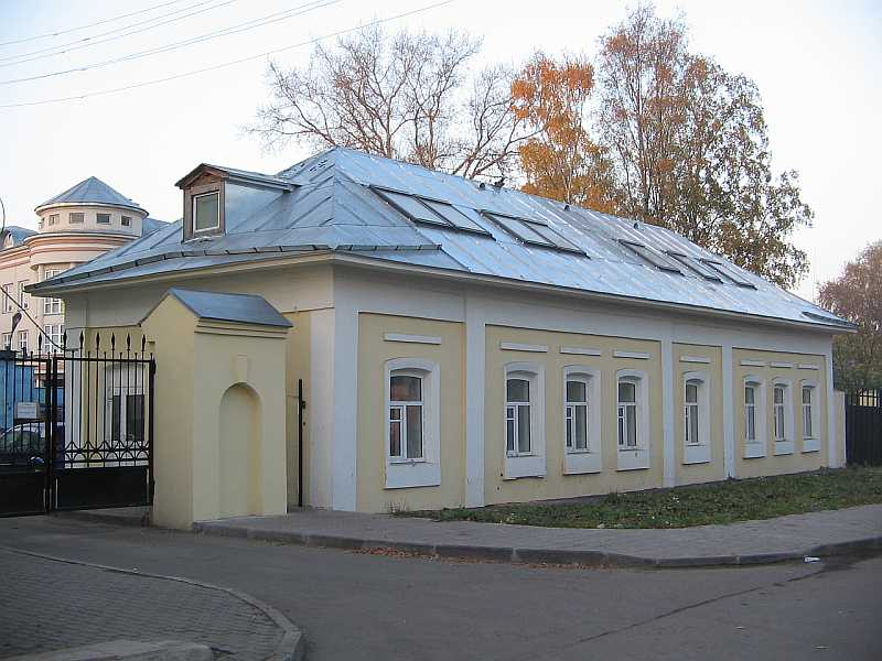 Пушкинская, 12, флигель Дома Вологодского дворянства, здание Вологодского общества изучения Северного Края (ВОИСК) и Северного кружка любителей изящных искусств (СКЛИИ)